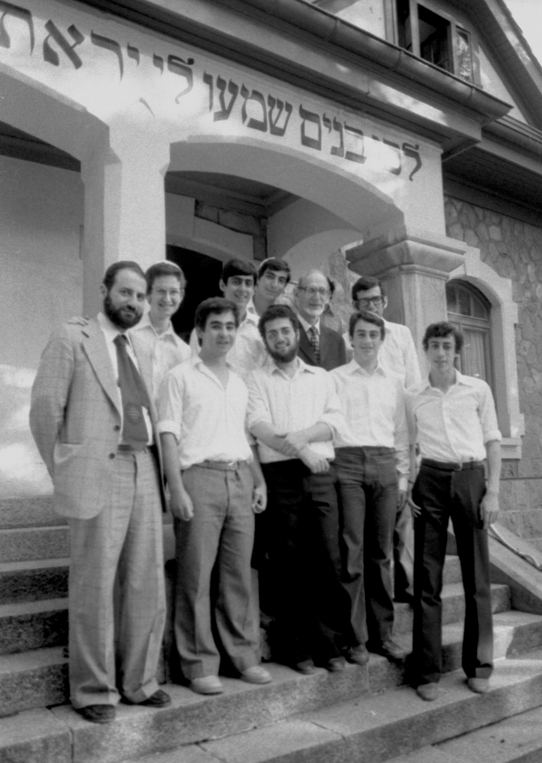 Yechiva Etz Haïm de Montreux - Les bacheliers autour de Rav Moshé Botschko, juillet 1979